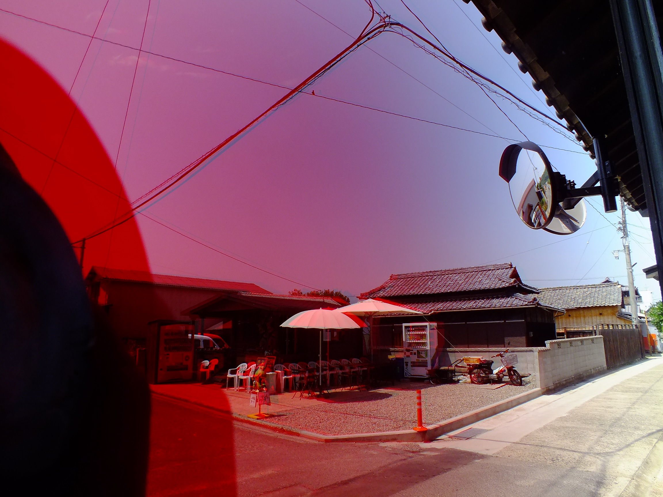 TEL: 0879-68-3555 （豊島美術館）